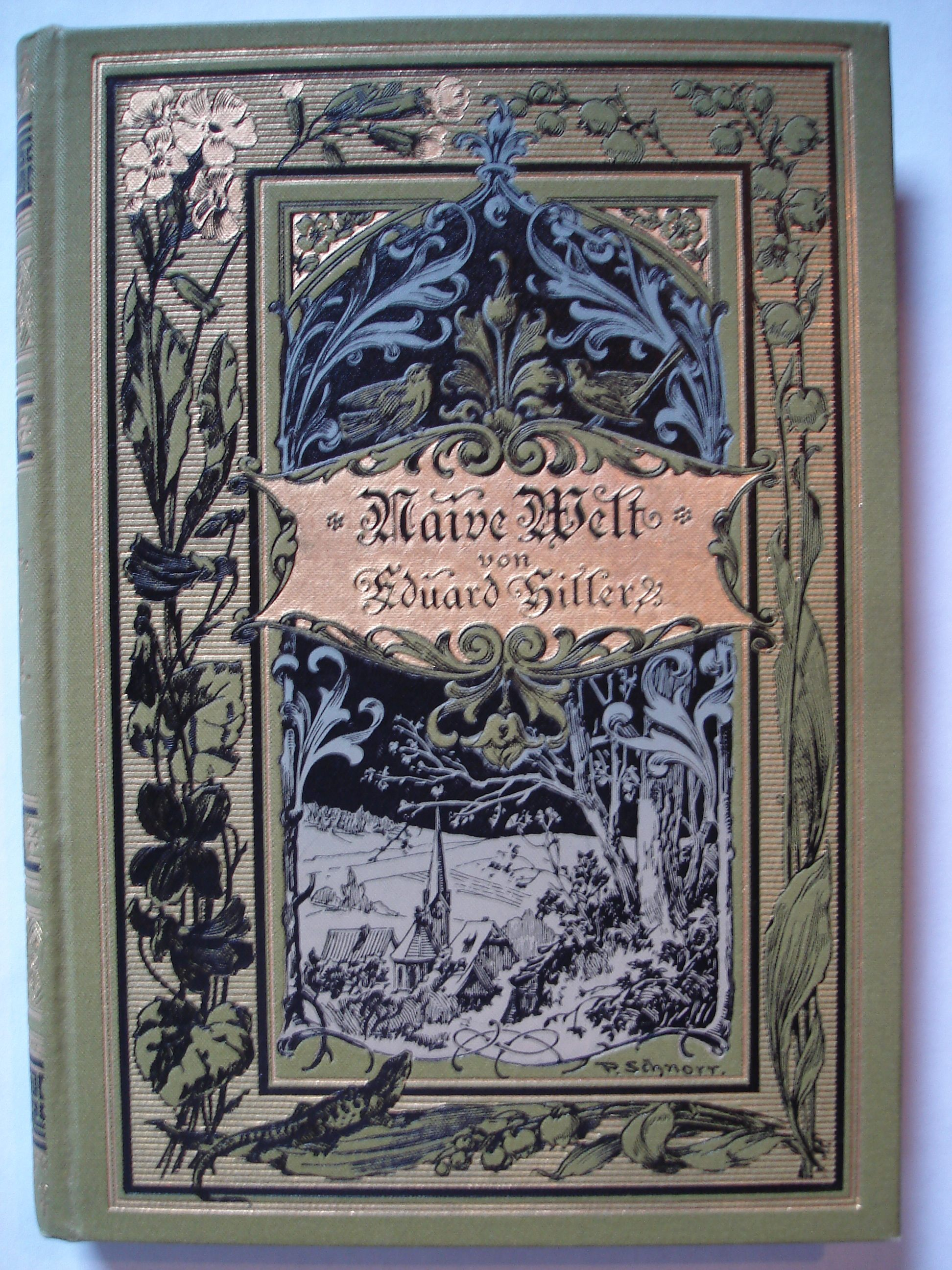 Gedichtband von Eduard Hiller, Gestaltung von Peter Schnorr (1862-1912)